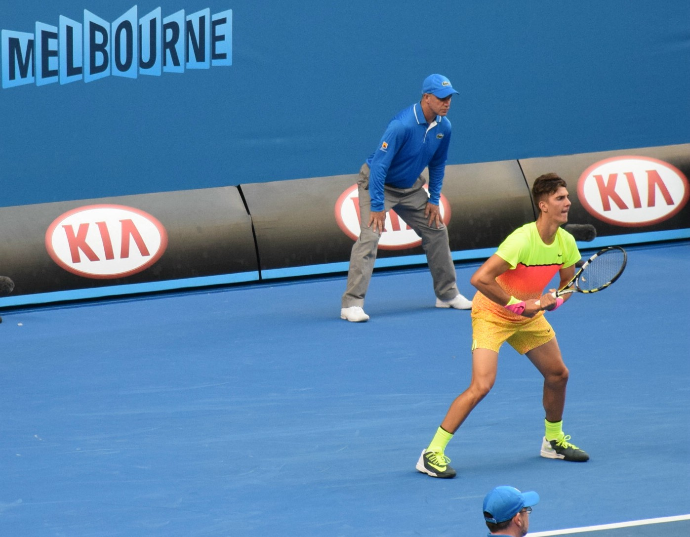 Thanasi Kokkinakis at the Australian Open 2015